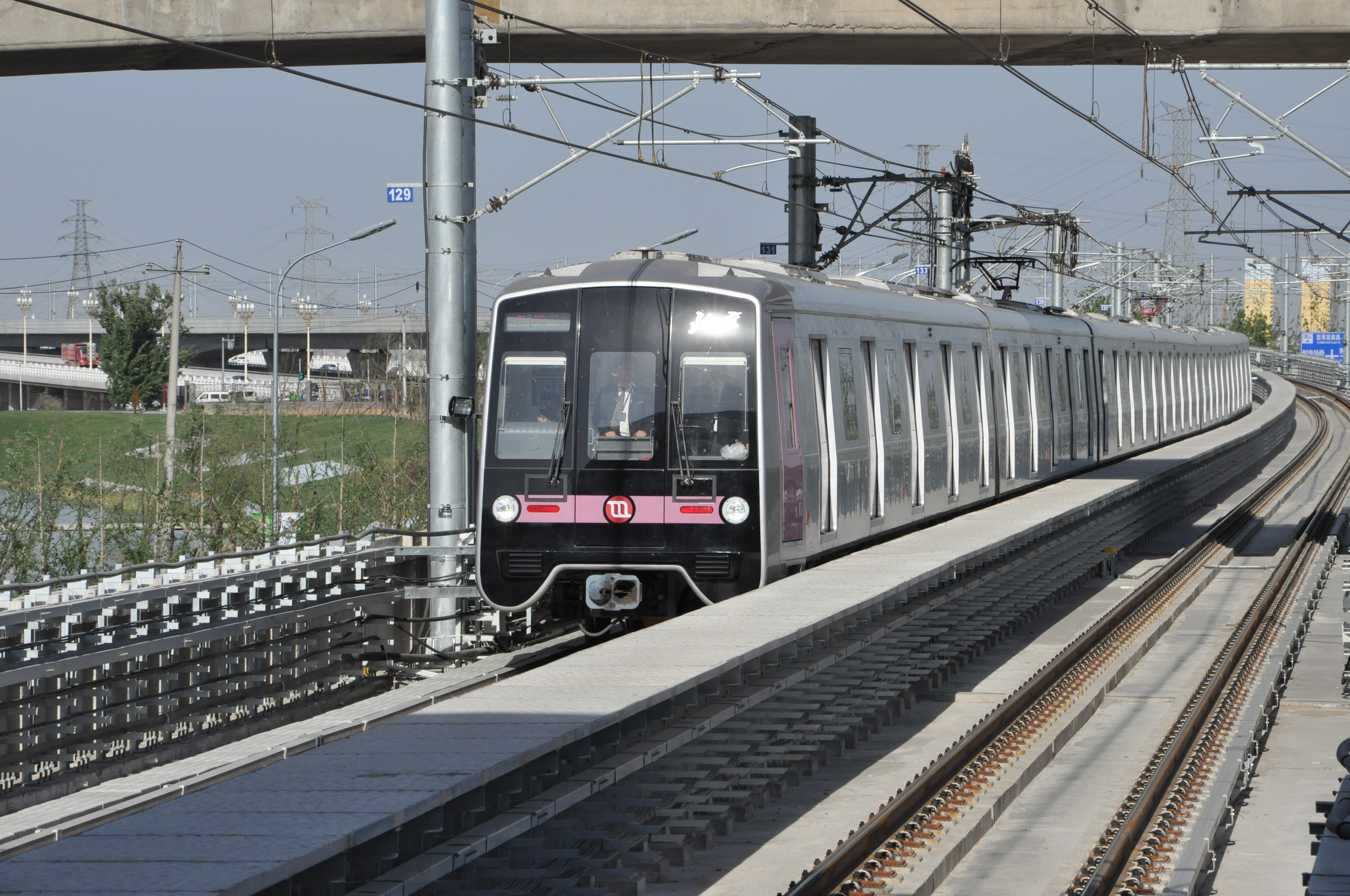 北京地铁14号线列车，摄于园博园站东端